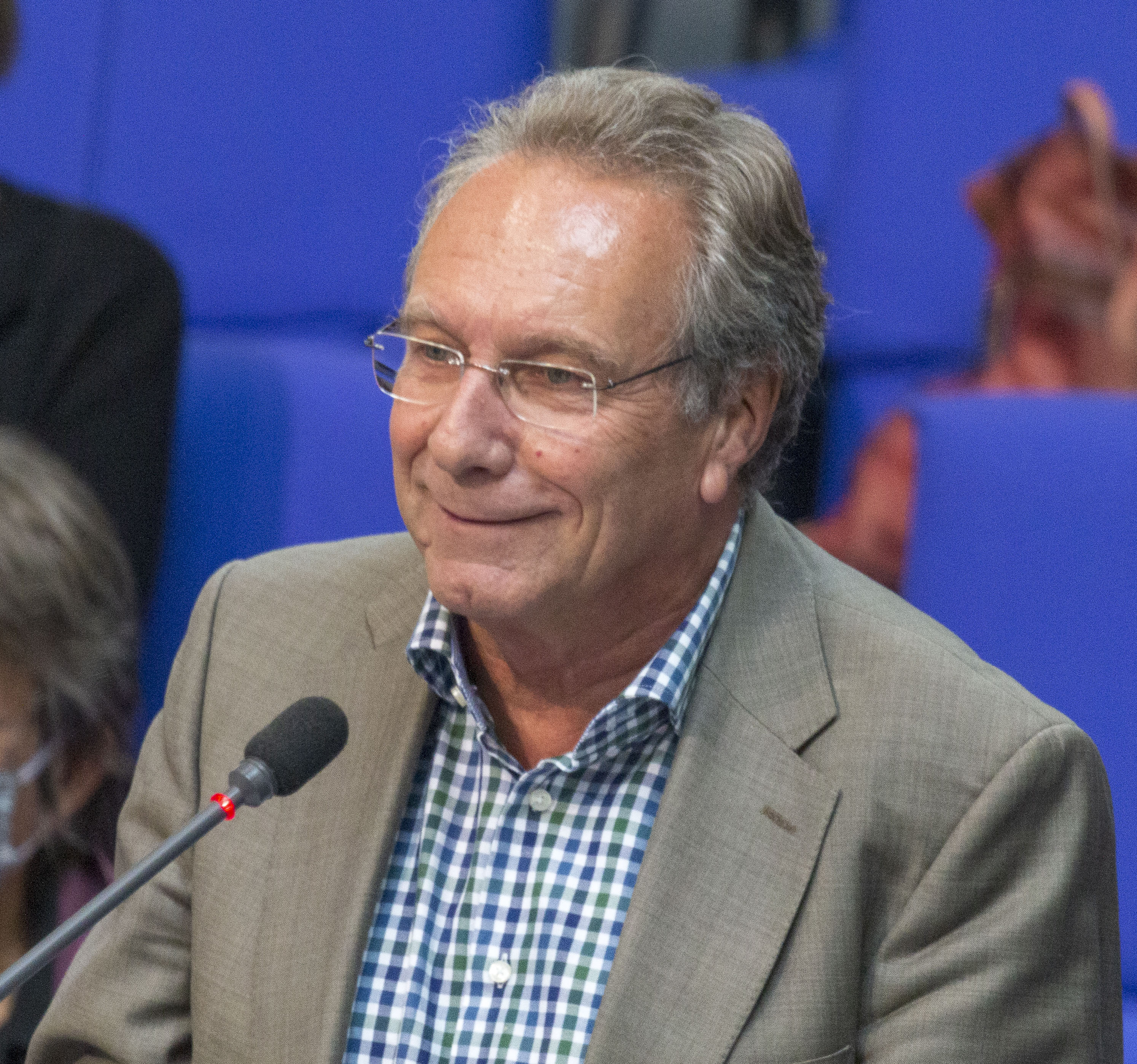 Klaus Ernst während einer Plenarsitzung des Deutschen Bundestages am 2. Juli 2020 in Berlin.